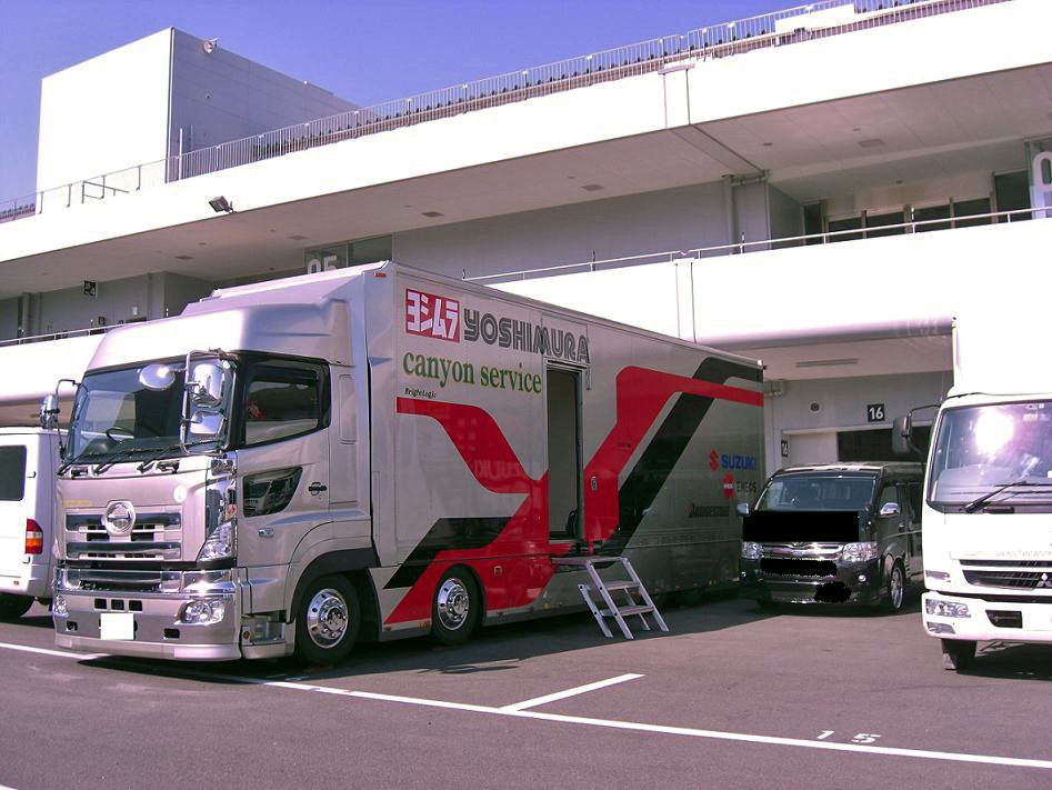 鈴鹿のパドックにて